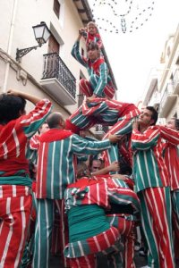 Valencià: Nova Muixeranga d'Algemesí (València, Espanya) Torreta Desplegada Doble